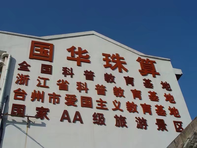 临海市国华珠算博物馆